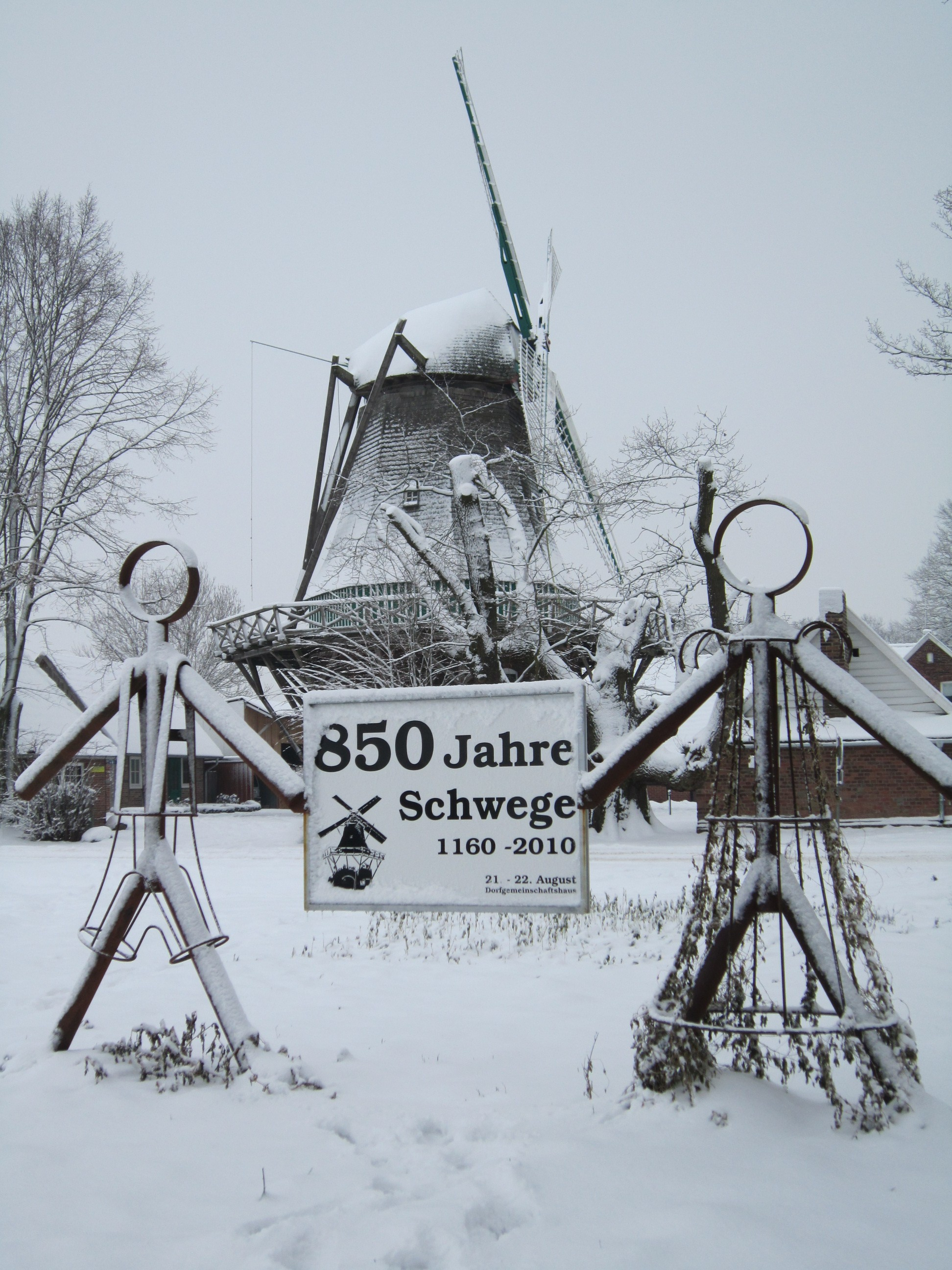 Ortseingang und Windmühle Schwege (Stadt Dinklage)